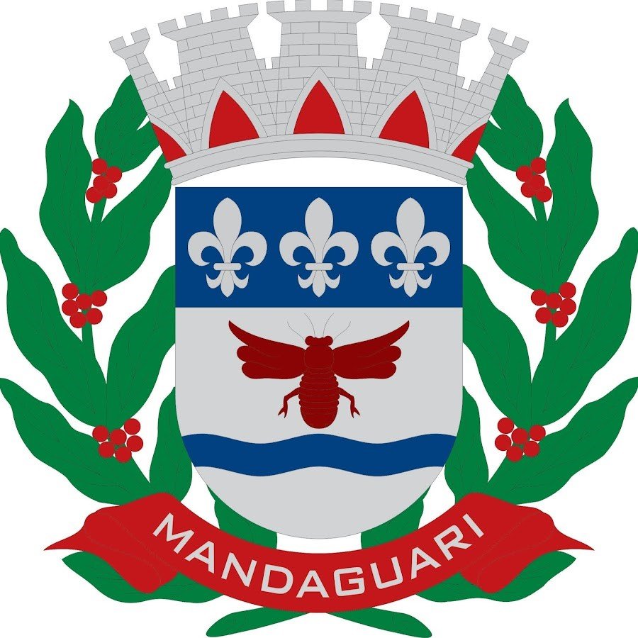 Brasão do Município de Mandaguari